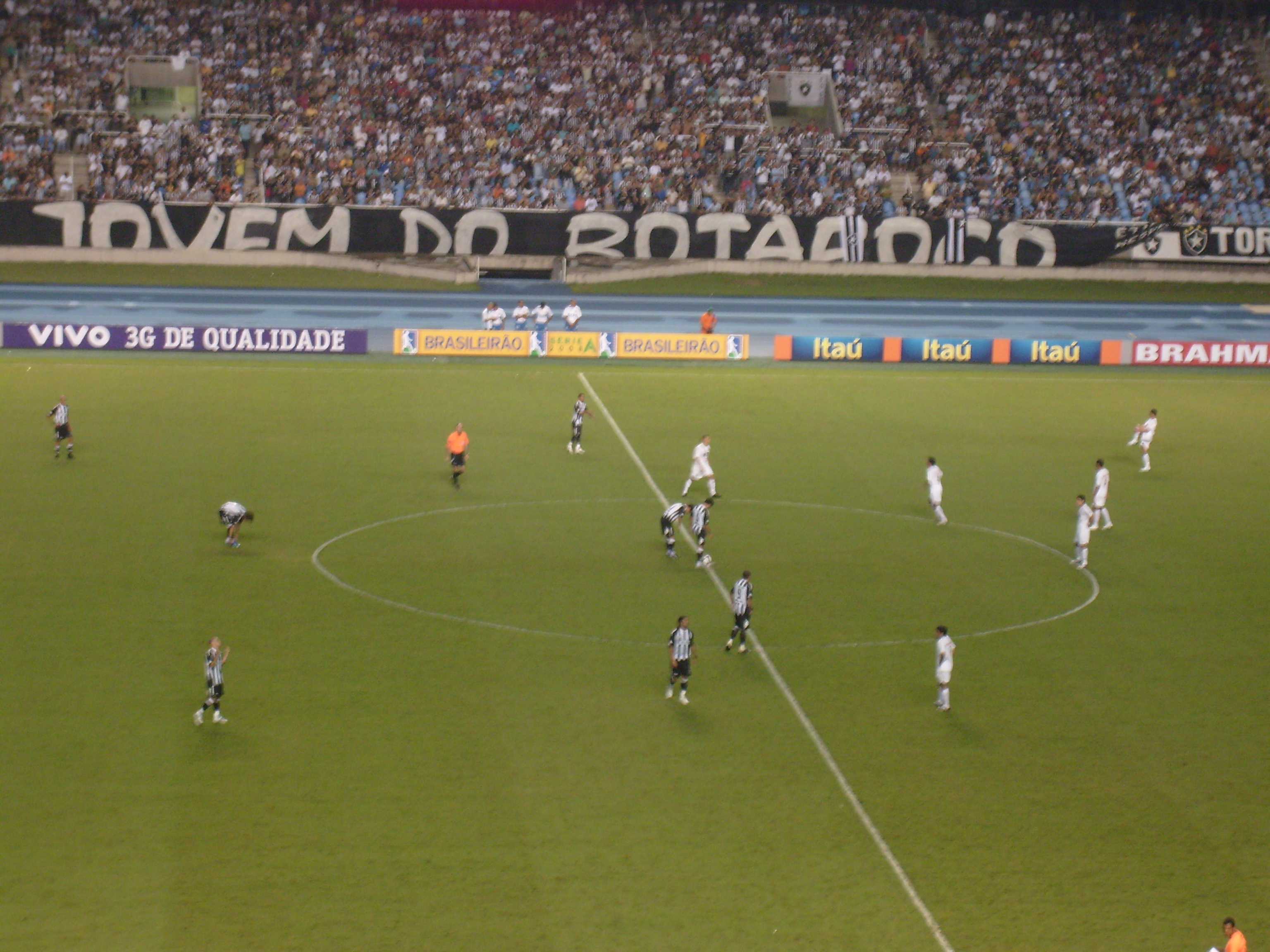 Partida entre Botafogo e Santos, no Estádio Olímpico João Havelange, no Rio de Janeiro, em 18 de outubro de 2008.